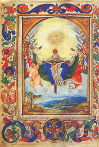 The Holy Trinity (DE: Die Heiligen Dreifaltigkeit), from the Missale festivum, ca. 1520 - 30. Aschaffenburg, Stiftskirche St. Peter und Alexander.